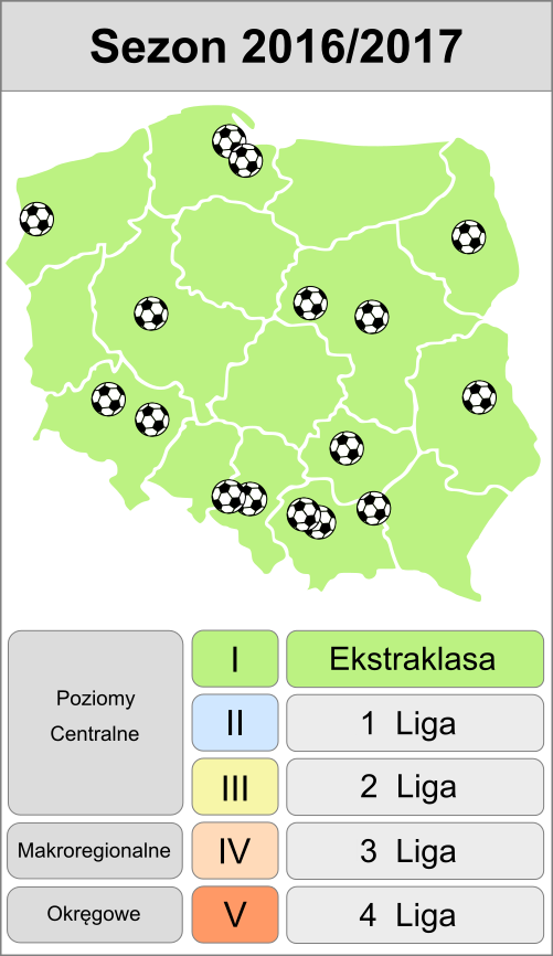 Drużyny występujące w ekstraklasie